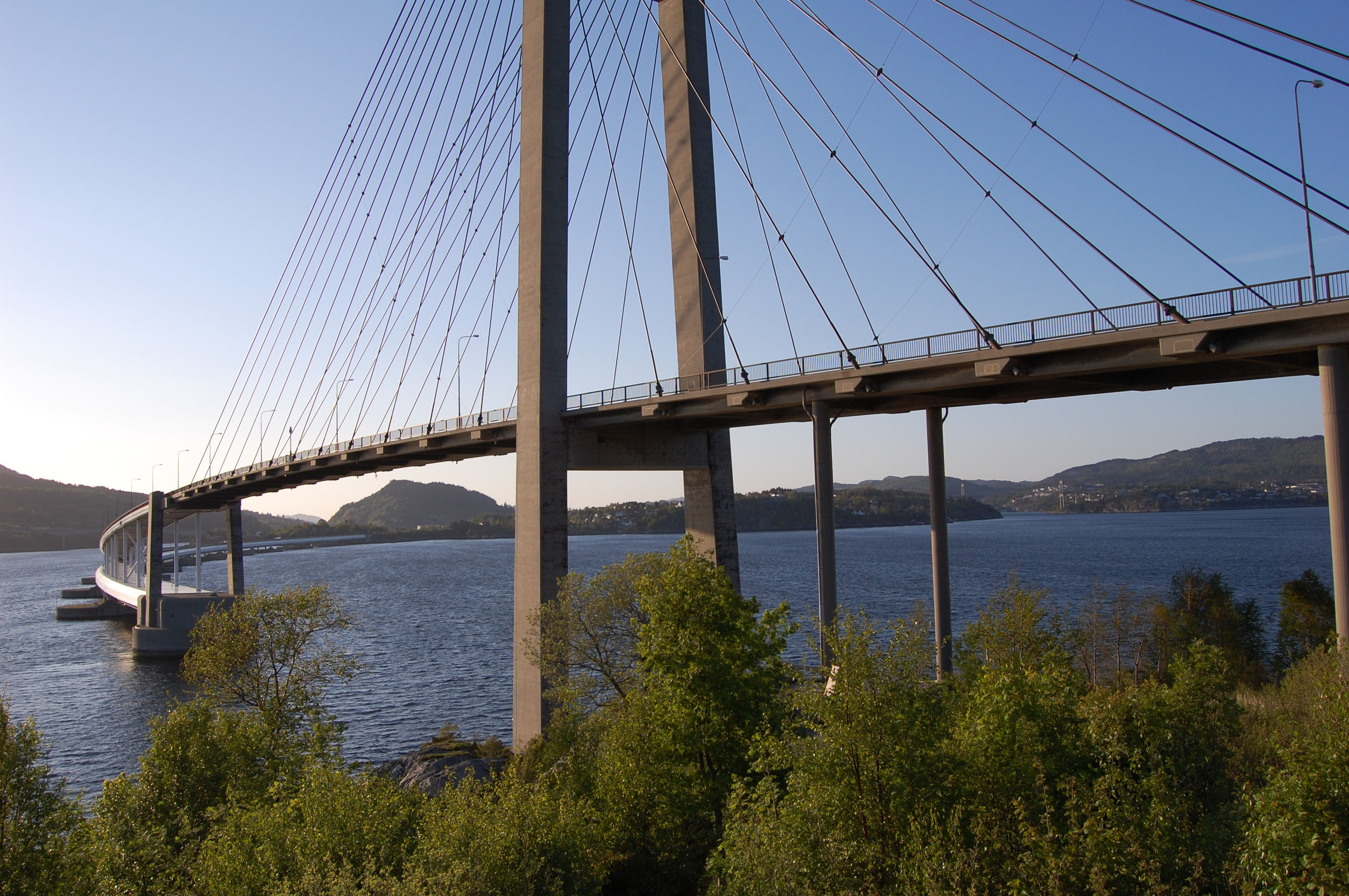 Nordhordlandsbroen